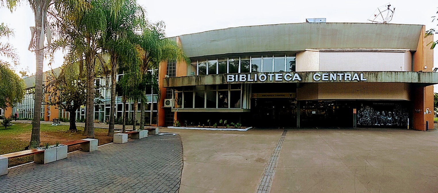 Vista da entrada da Biblioteca UFSC 2019